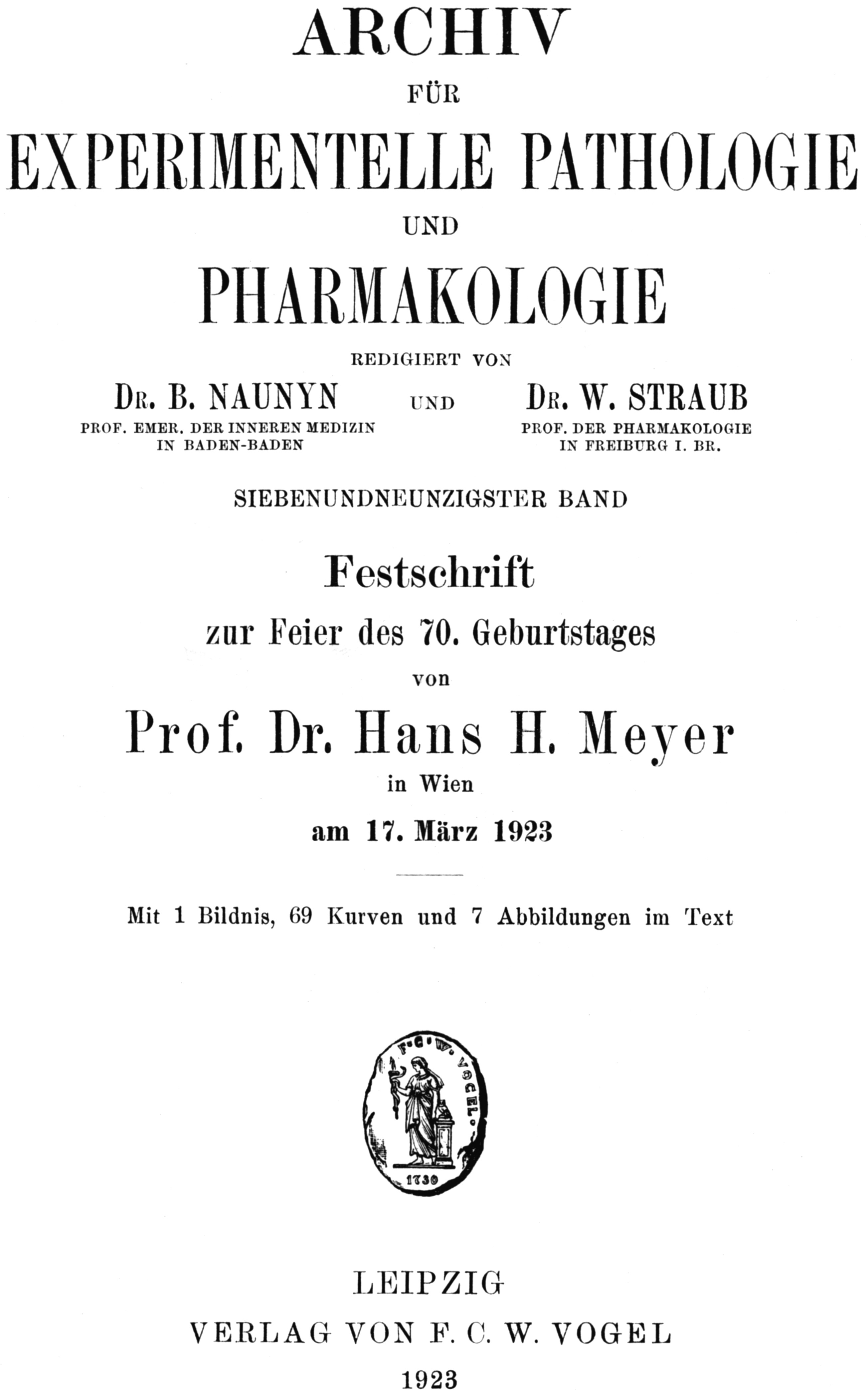 Titelseite der Geburtstagsfestschrift von Hans Horst Meyer von 1923